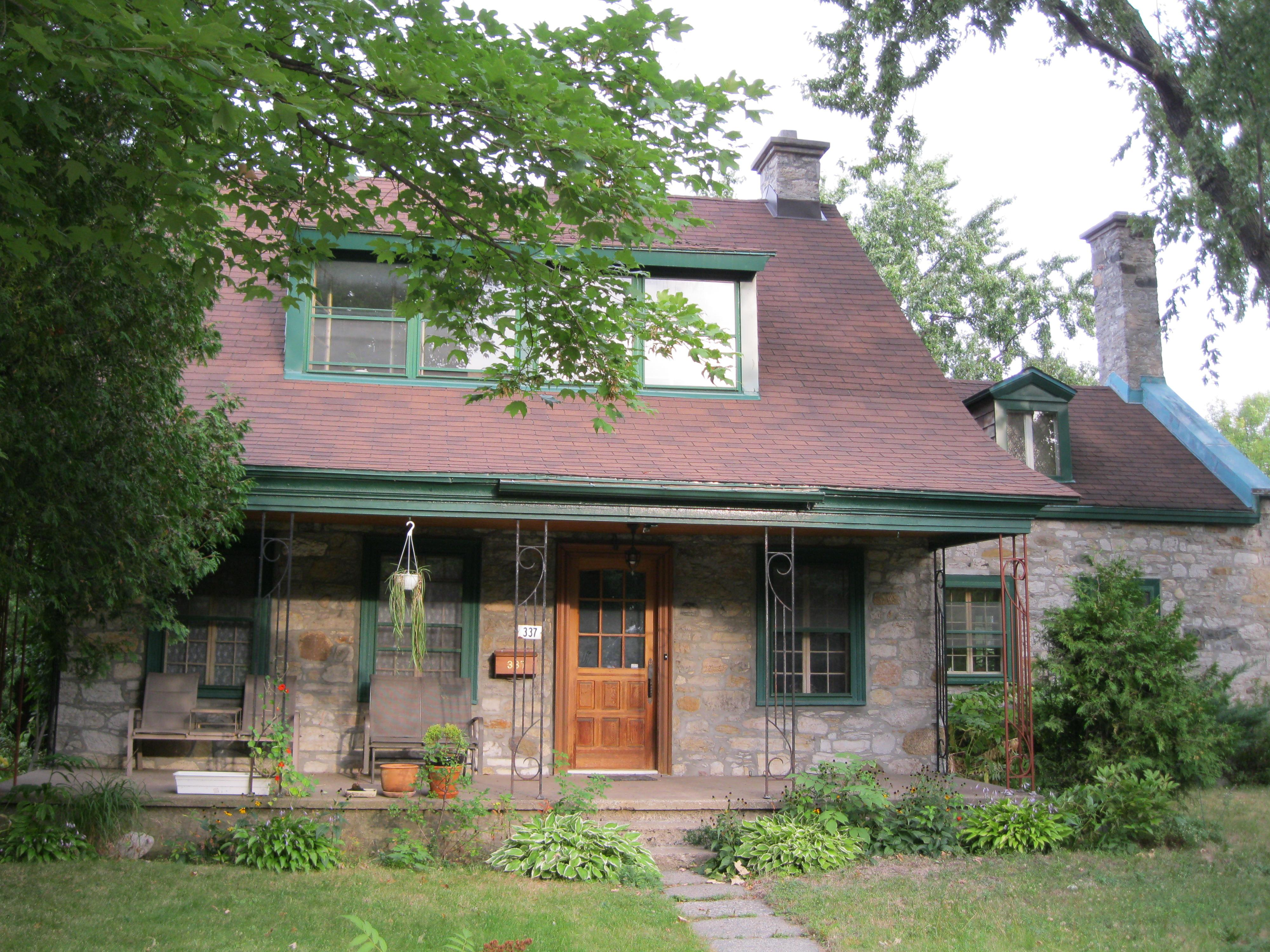 La maison Joseph-Dagenais, construite en 1825, est située au 337 Gouin est, à l'intersection de la rue Saint-Denis, dans l'arrondissement de Ahuntsic-Cartierville, à Montréal. Wikimapia